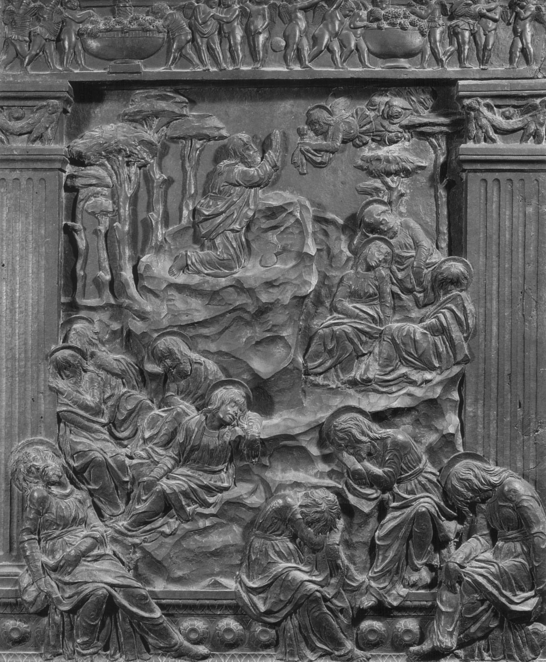 Il Pulpito della Passione, in San Lorenzo a Firenze, opera di Donatello. Dettaglio: Orazione nell'Orto. Fotografia Alinari, 1852.